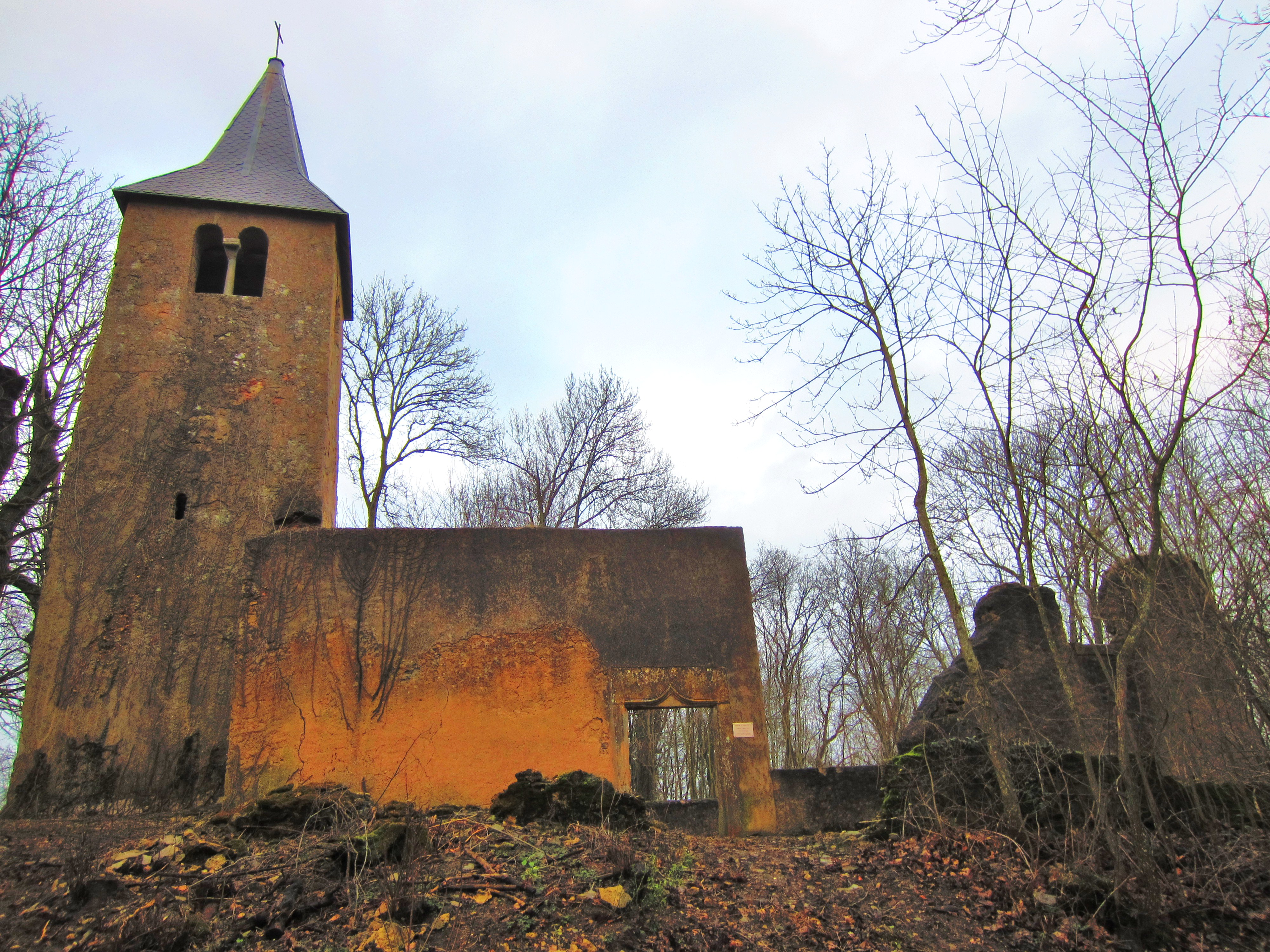 Description